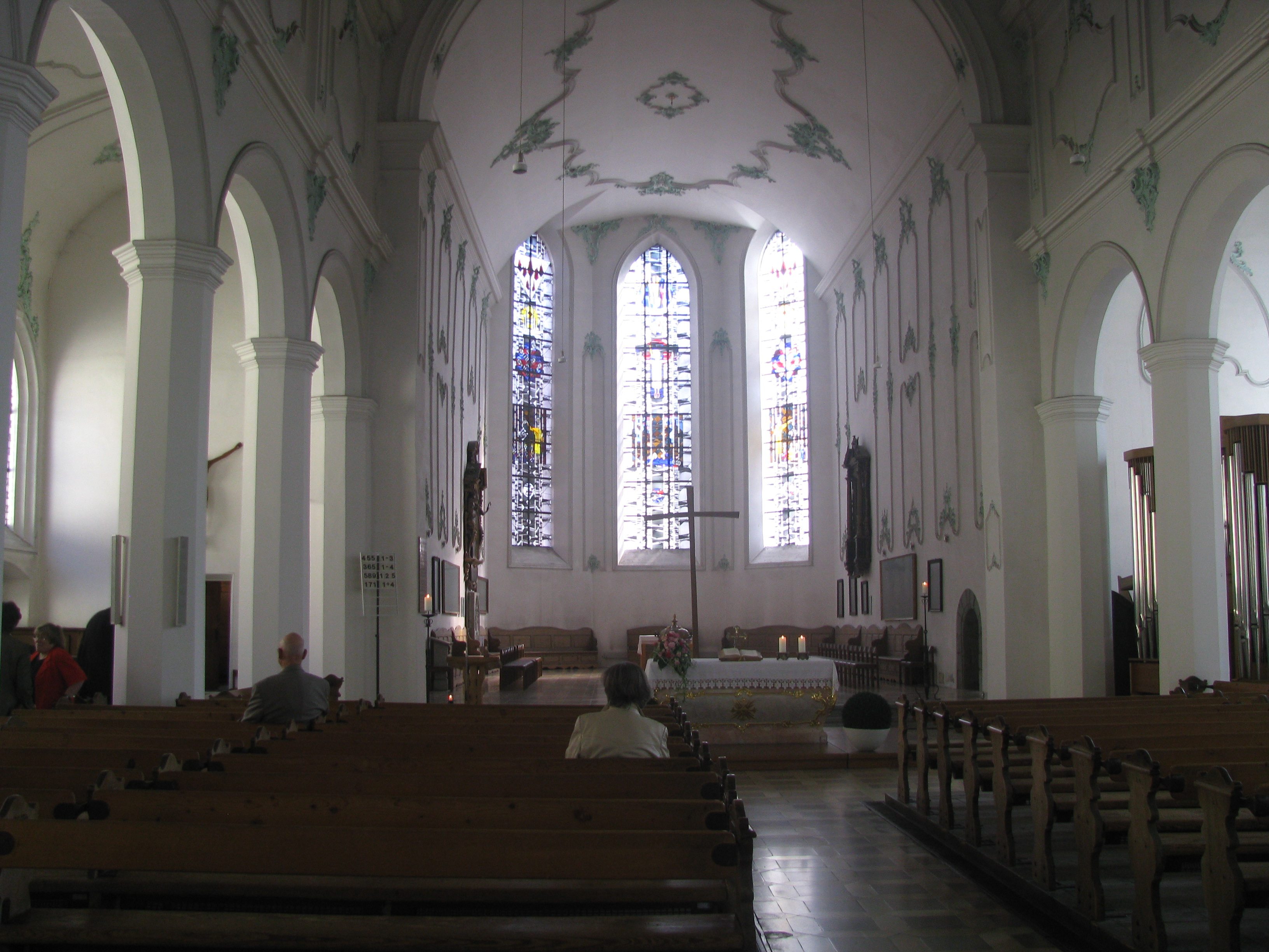 Evangelische Kirche St. Stephan in Lindau